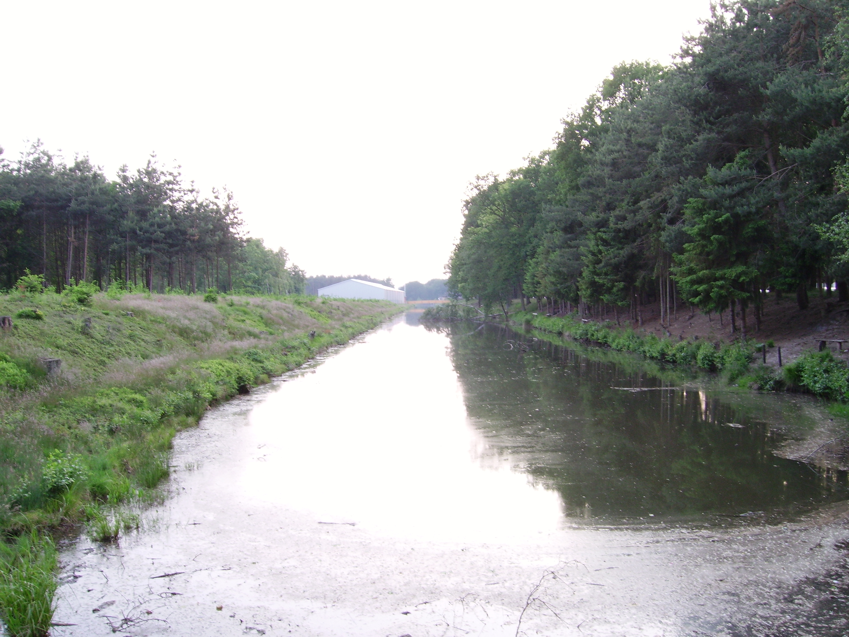 Der nie vollendete Bodelschwingh-Stollen in Hörstel, Kreis Steinfurt, Nordrhein-Westfalen, Deutschland.